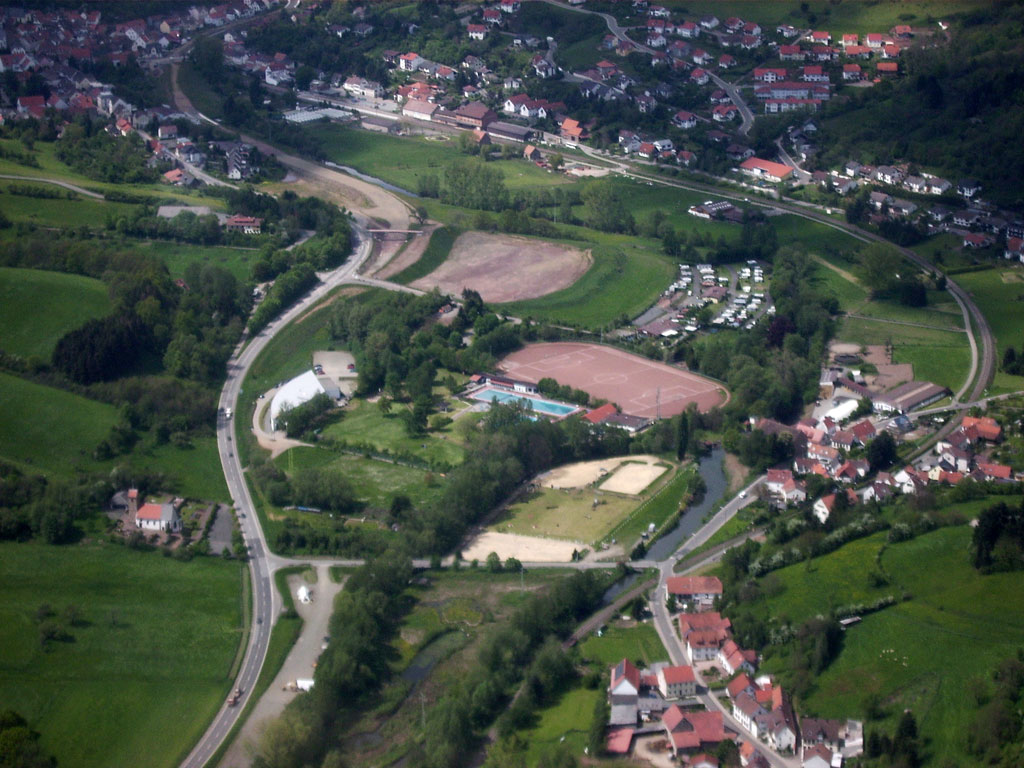 Wolfstein teilweise aus der Luft. Blick auf den Sportplatz (Bildmitte), Gelände des neuen Rasenplatzes (darüber), Campingplatz, Warmfreibad, Sport- und Freizeitcenter, Volleyballplatz sowie Reitplatz. Links im Bild die Zweikirche zu Rutsweiler. Rechts unten Roßbach, am oberen Bildrand die Stadt Wolfstein.